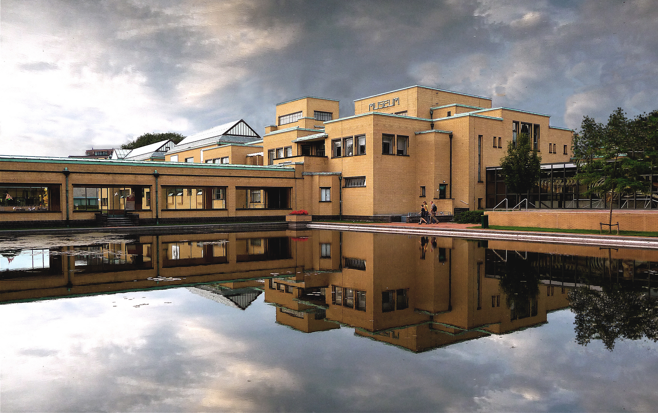 Zicht op een deel van het Kunstmuseum Den Haag. Architect Berlage